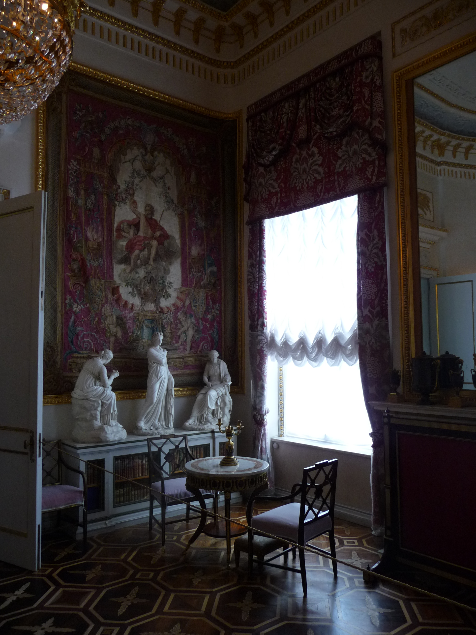 Palace-p1030768.jpg